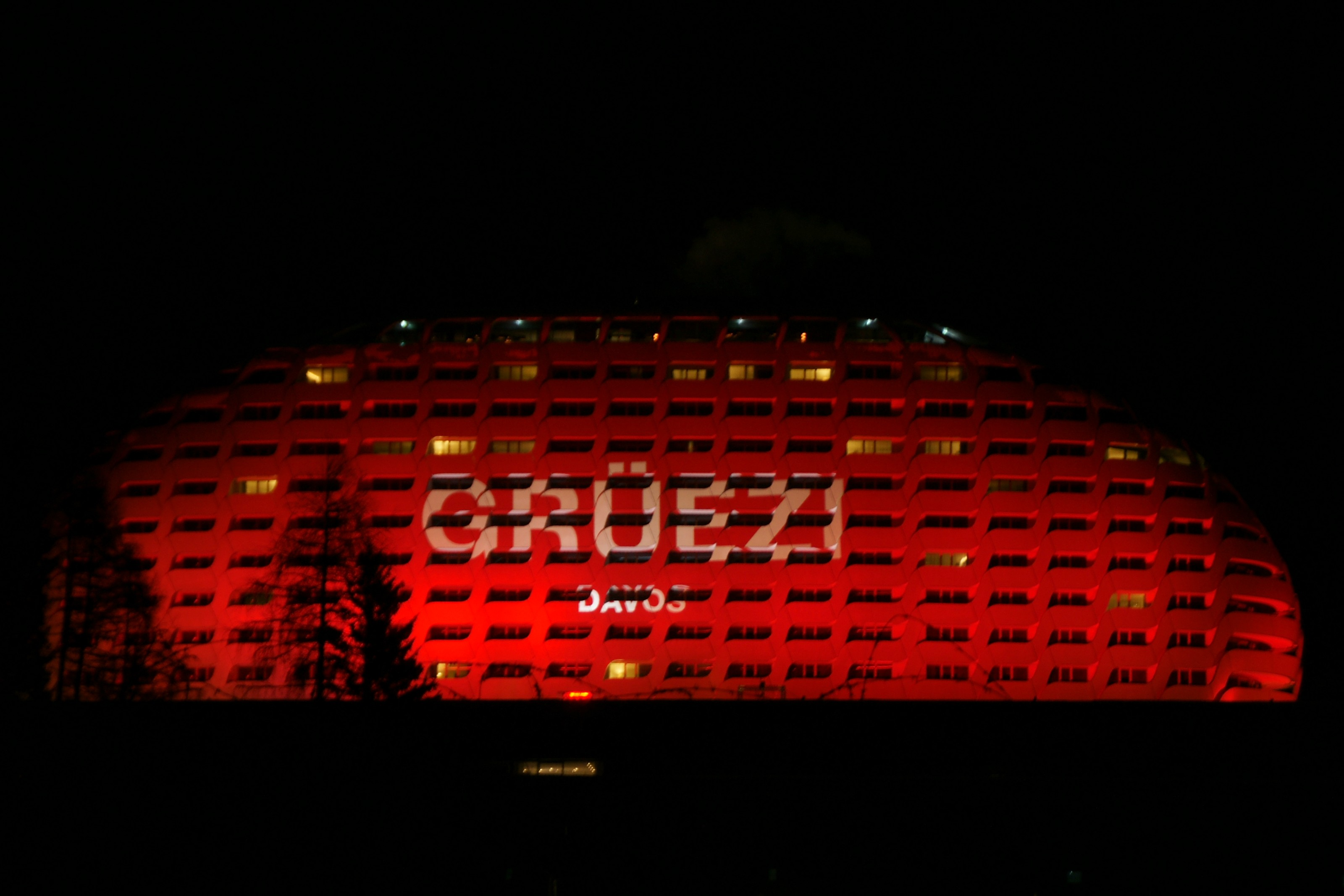 InterContinental Hotel, Davos (nachts)